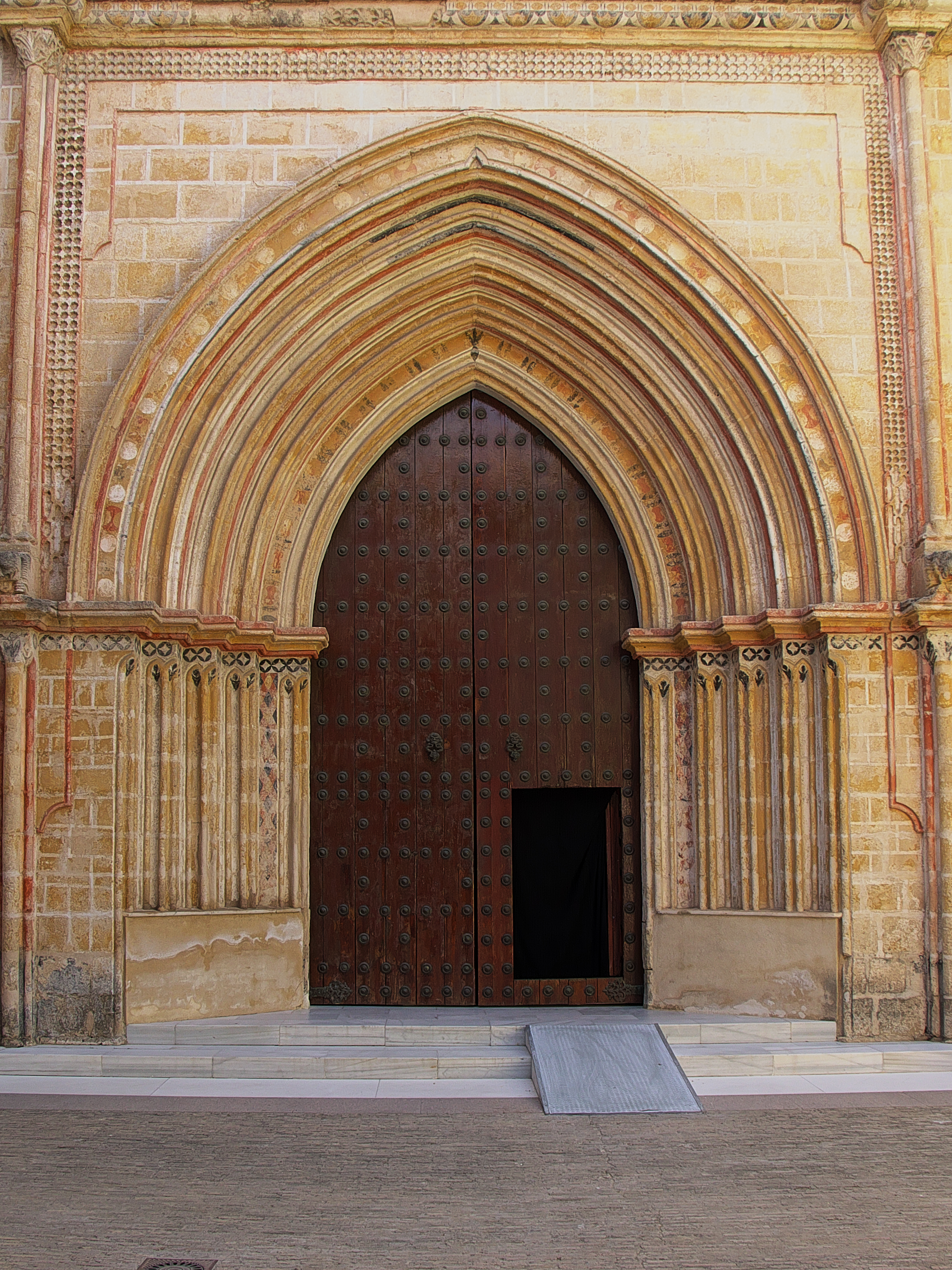 Sevilla: Iglesia de la Cartuja (1419). Patrocinada por Per Afán de Ribera, el Viejo. Portada de los pies.